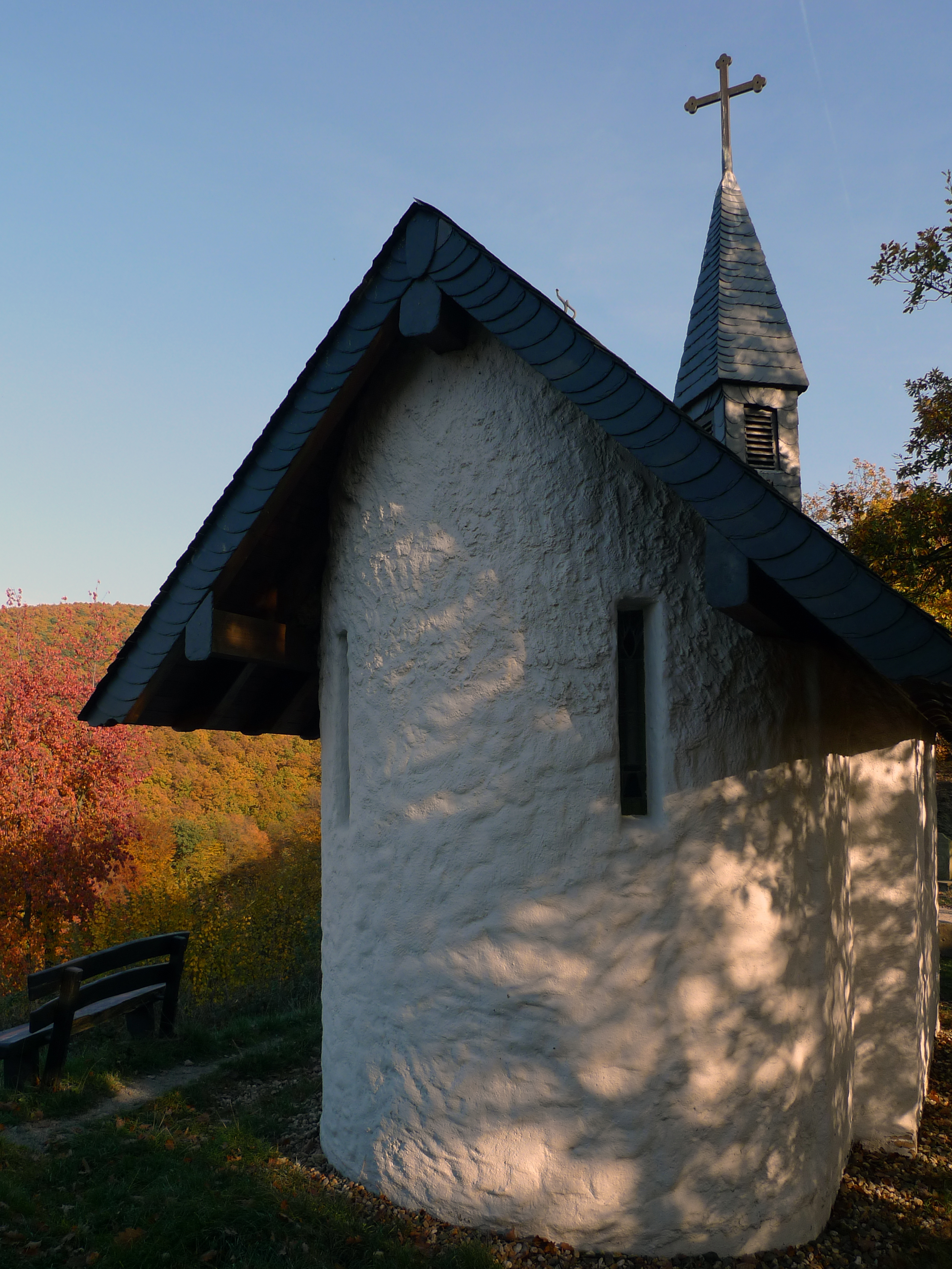 Waldkapelle auf der Mausauel. Erbaut 1995.